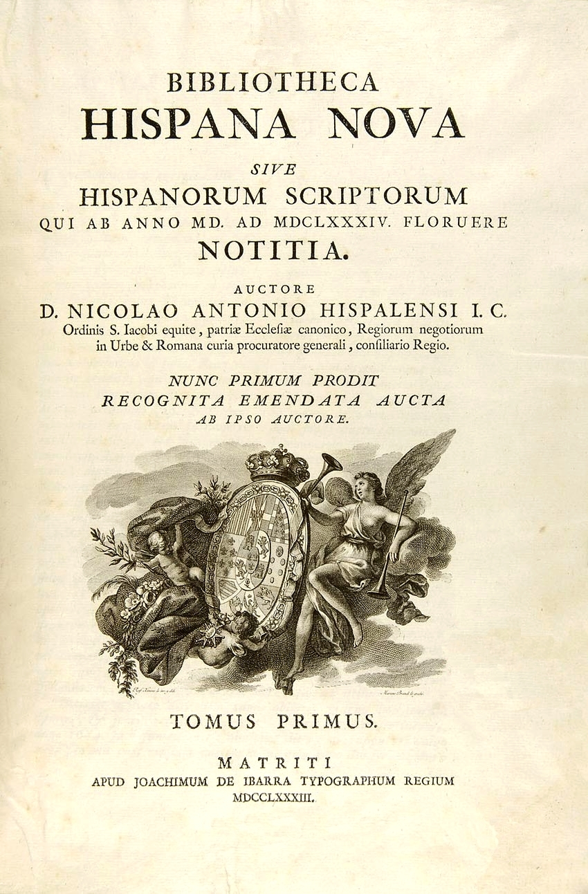 Portada de la Bibliotheca Hispana Nova, de Nicolás Antonio (1617 - 1684)